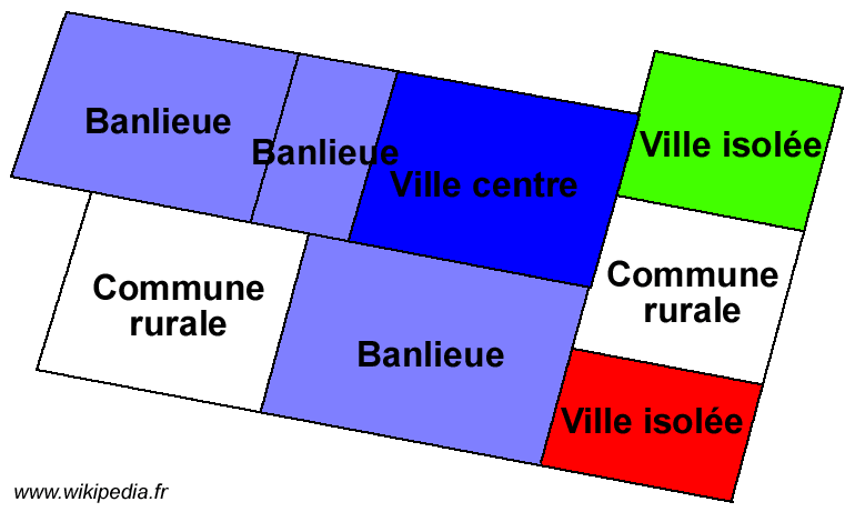 Schéma illustrant l'article sur la notion d'unité urbaine (6 sur 6)